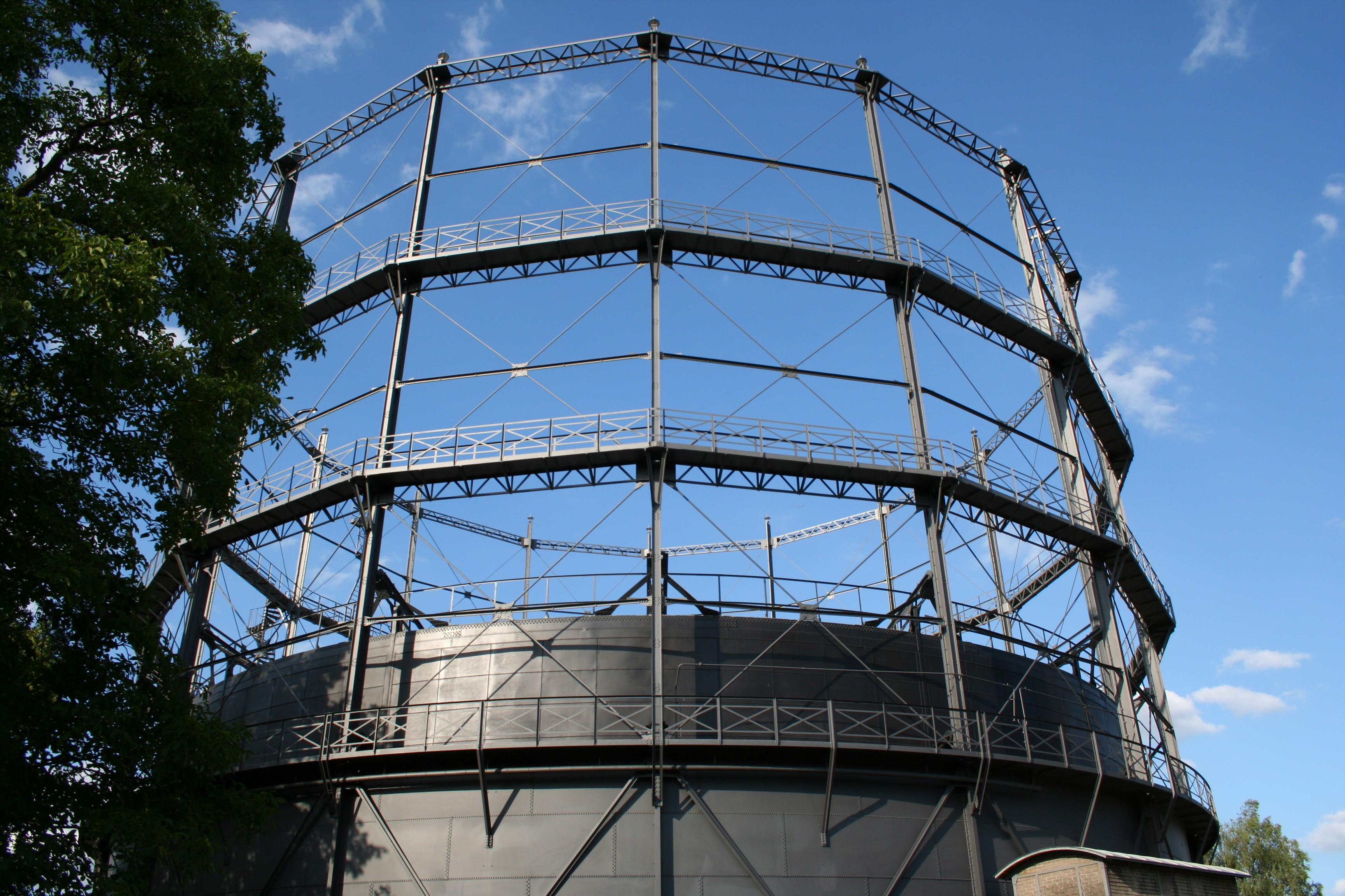 Das letzte verbliebene von ursprünglich drei Gasometern in Schlieren, Schweiz. Abhängig vom Speichervolumen konnte der „Deckel“ des Gasometers hoch oder herunter gefahren werden. Der Schweizer Heimatschutz über das Gasometer